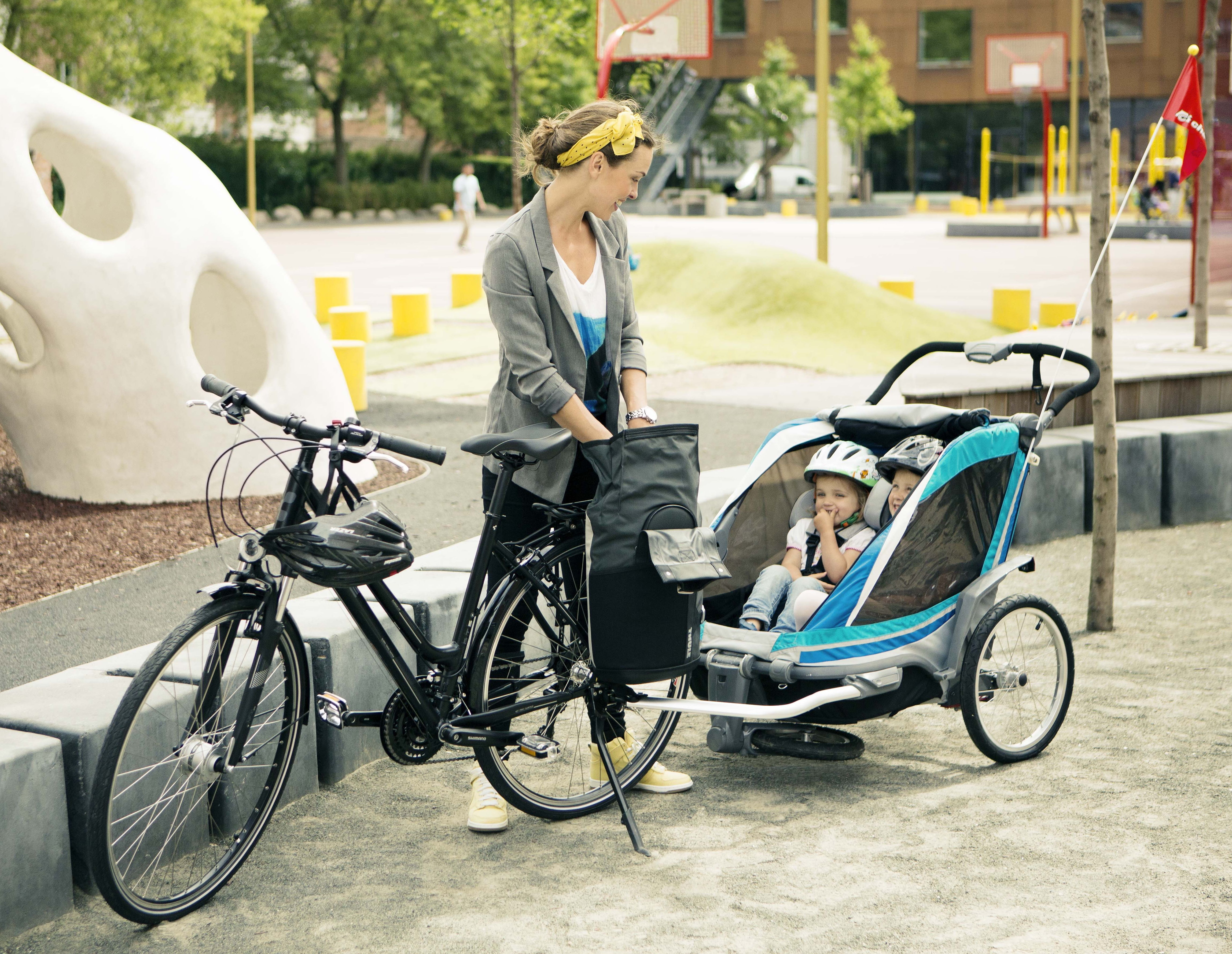 Thule